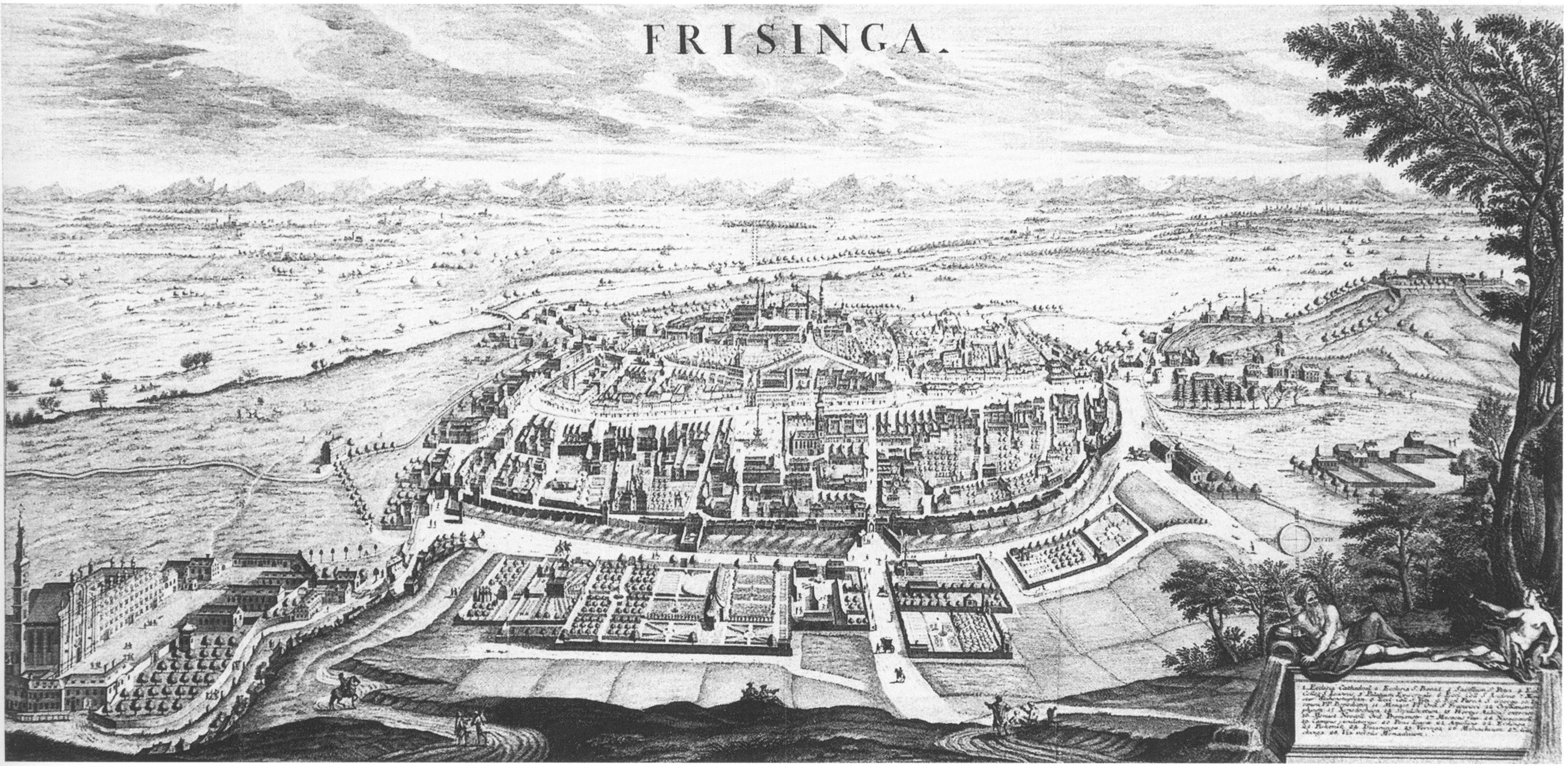 Gottfried Stain nach Jean Claude Sarron: FRISINGA, 1724, Kupferstich,Freising von Norden um 1724